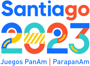 Símbolo de los Juegos Panamericanos de Santiago 2023.